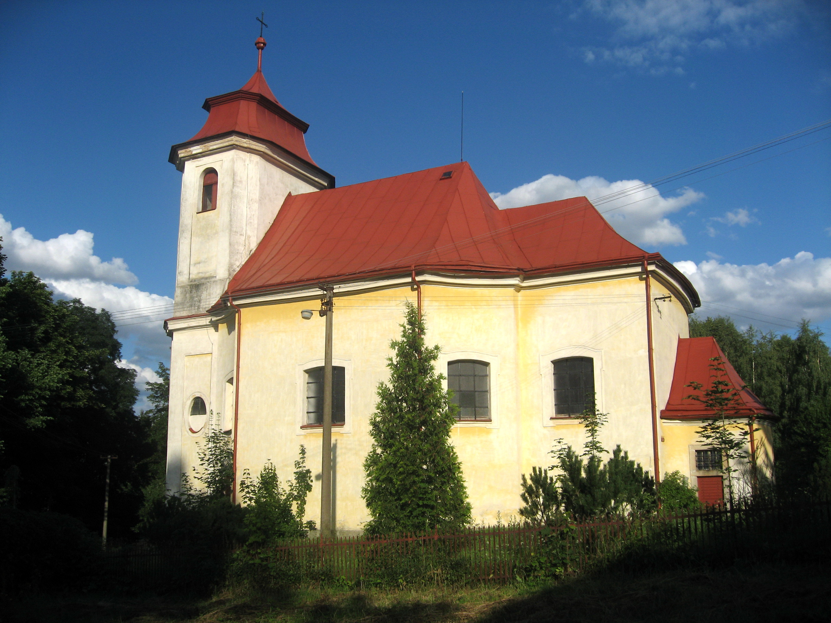 Skála, kostel Nanebevzetí Panny Marie ve Skále